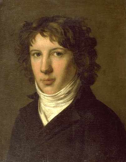 copie d'un original conservé dans une collection particulière française